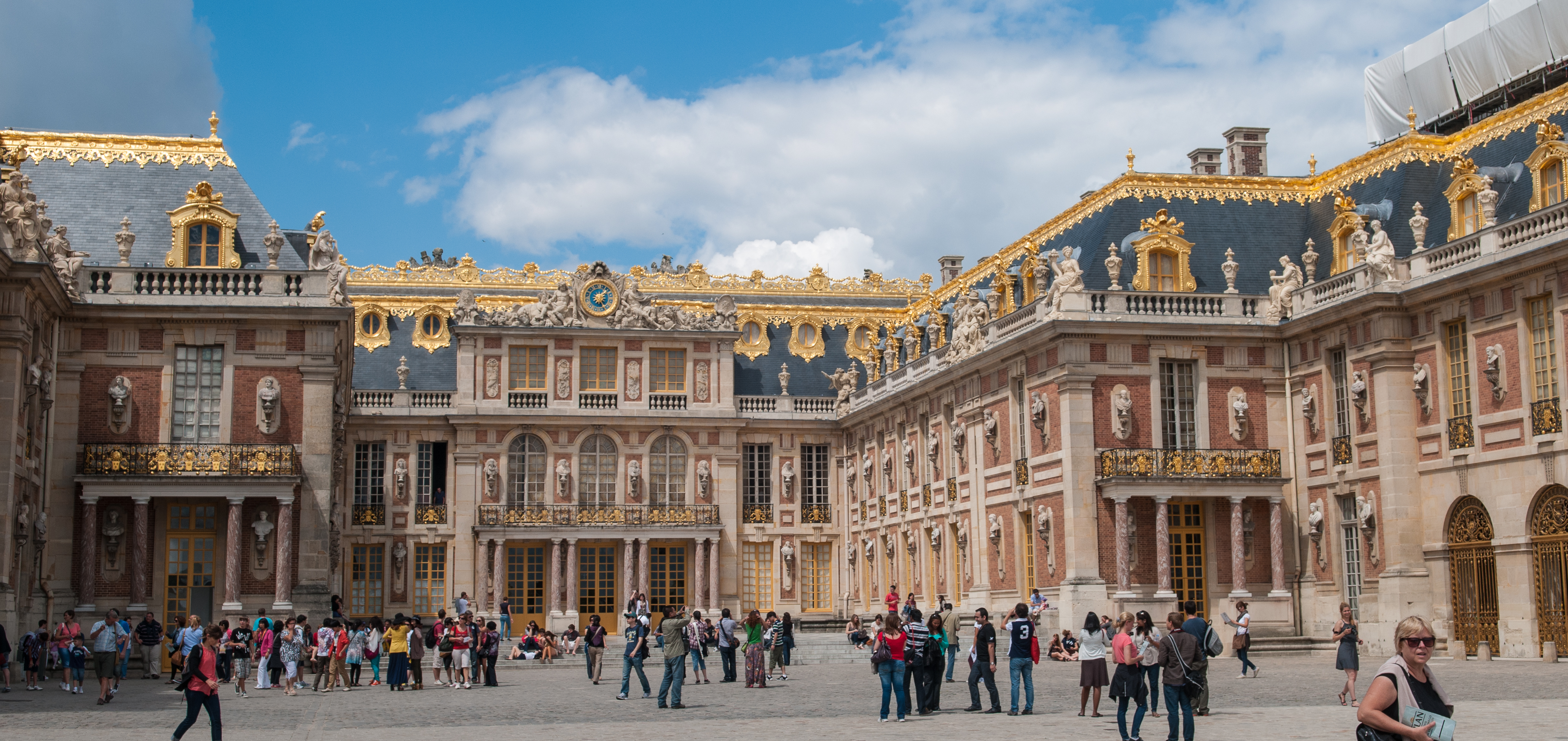 Chateau de Versailles, France